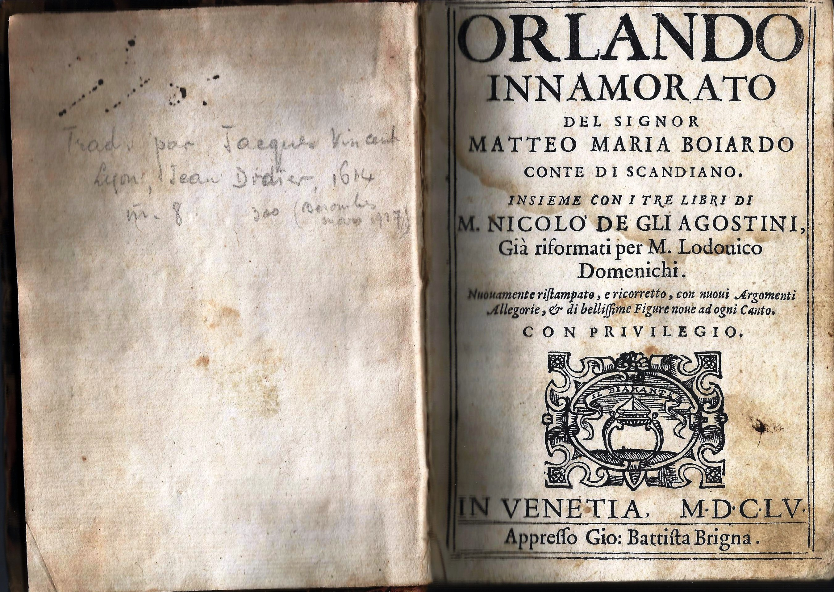 Edition de l'Orlando Innamorato de Boero en 1665, chez Baptista Brigna à Venise.